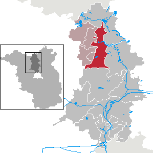 Gransee in Brandenburg (Country) - District Oberhavel